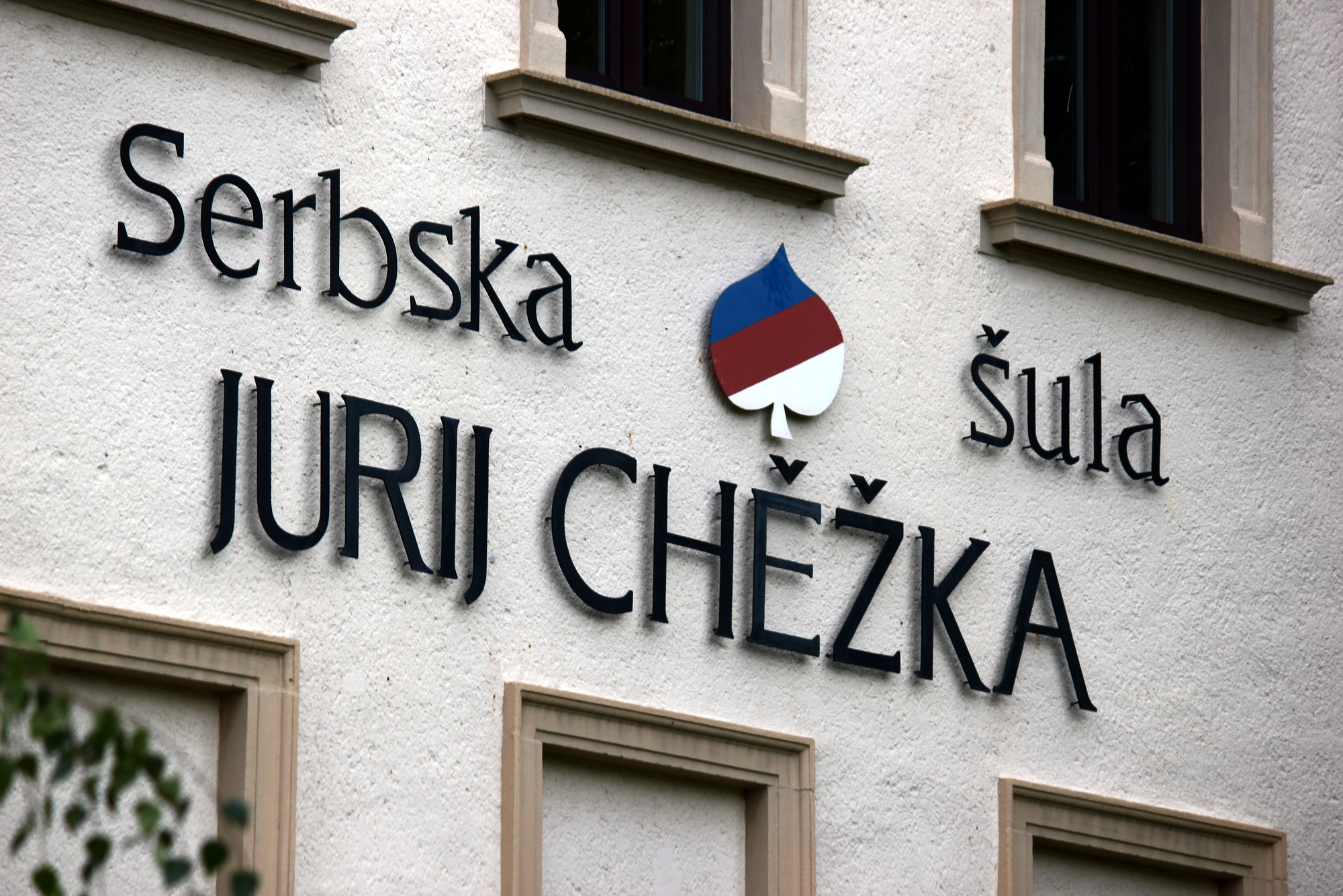 Hornjoserbsce: Serbski napis w Chrósćicach.